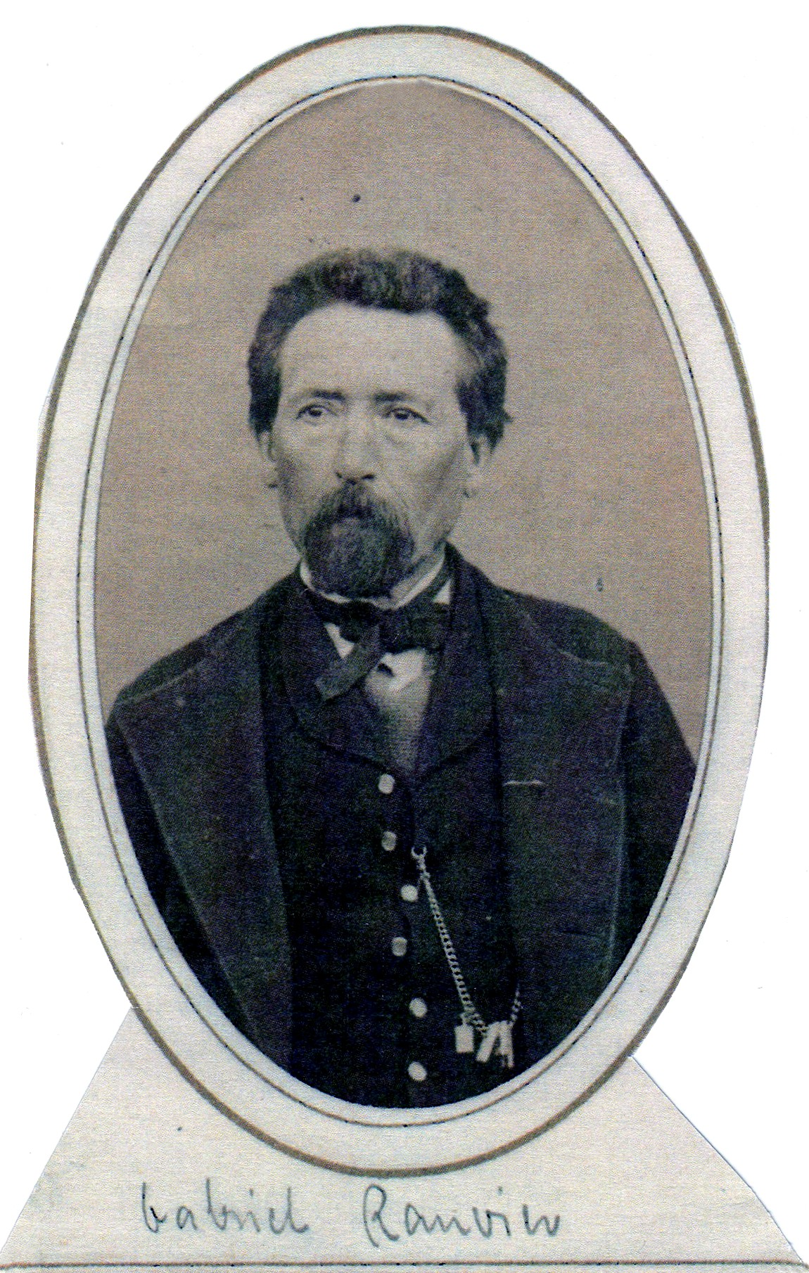 Gabriel Ranvier photographié à Londres. Collection particulière, publié dans l'album de l'exposition « Le temps des cerises : la Commune en photographies » présentée au Musée de la photographie de la Commune Française à Charlerois du 24 septembre 2011 au 15 janvier 2012 sous la direction de Jean Baronnet et Xavier Canonne.